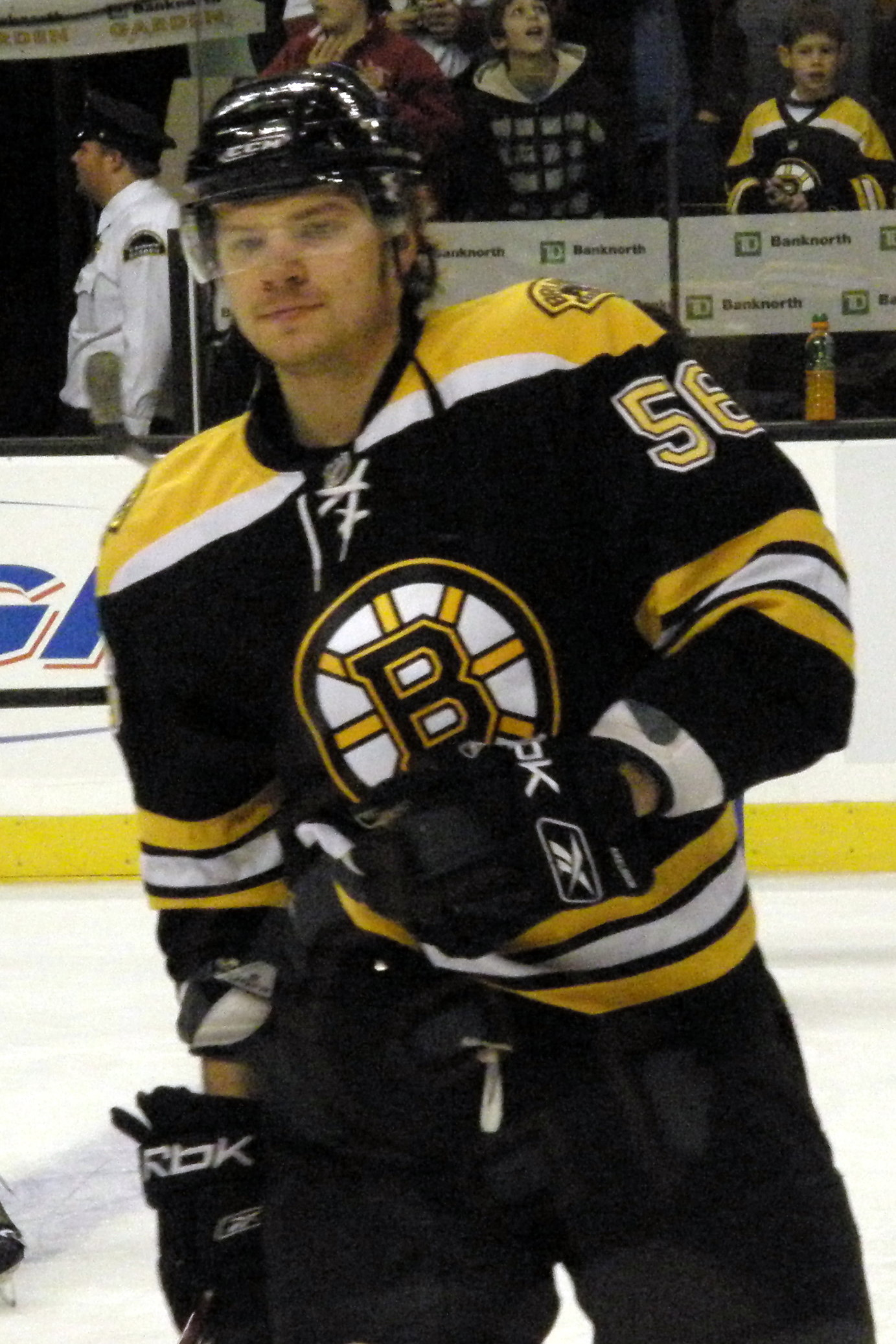 #56 Petteri Nokelainen (C)